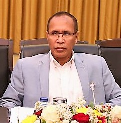 Alcino Baris bei der Sitzung des Staatsrats